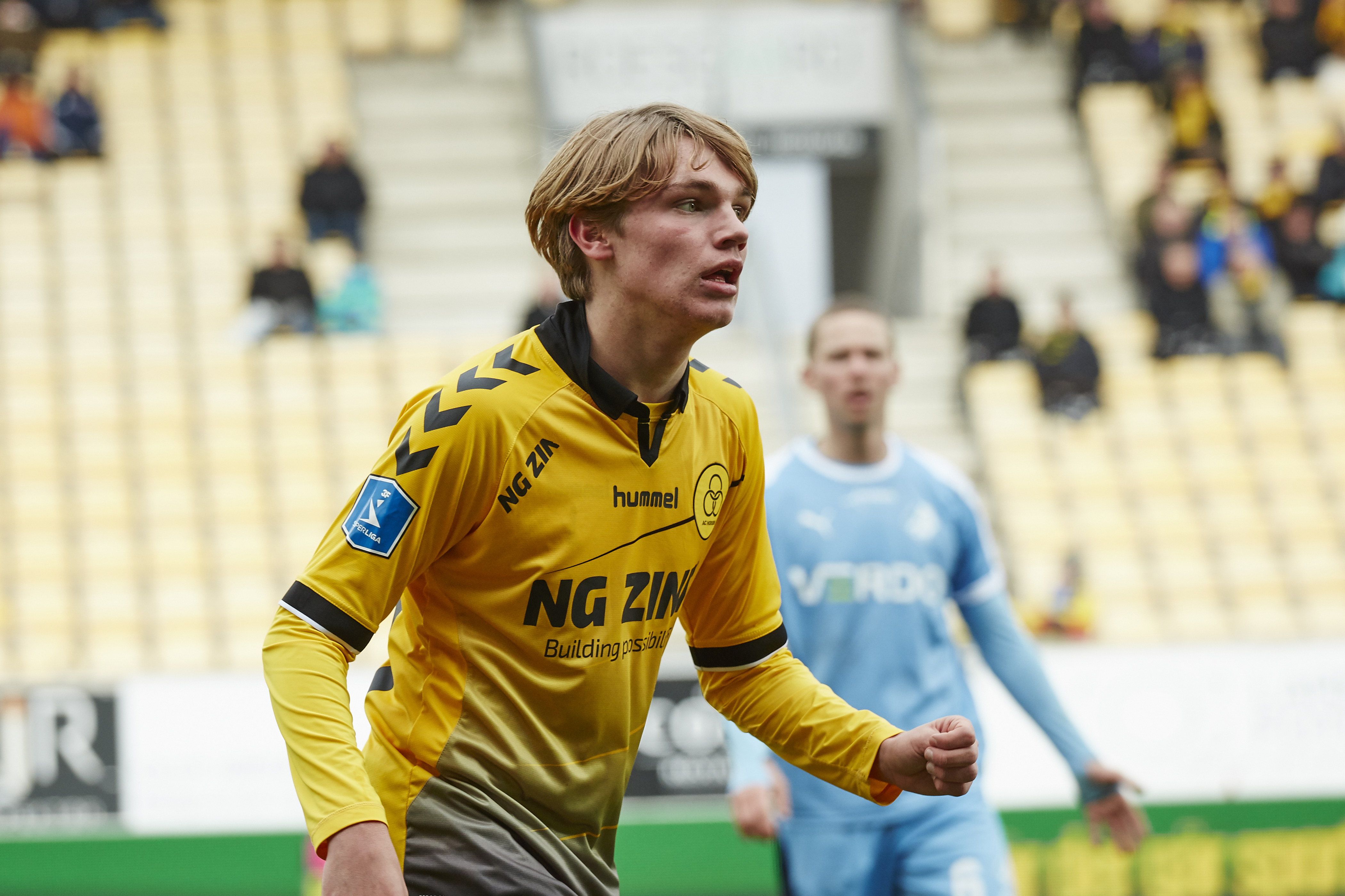 Jeppe Kjær i hans Superligadebut på CASA Arena Horsens i kampen mod Randers FC.